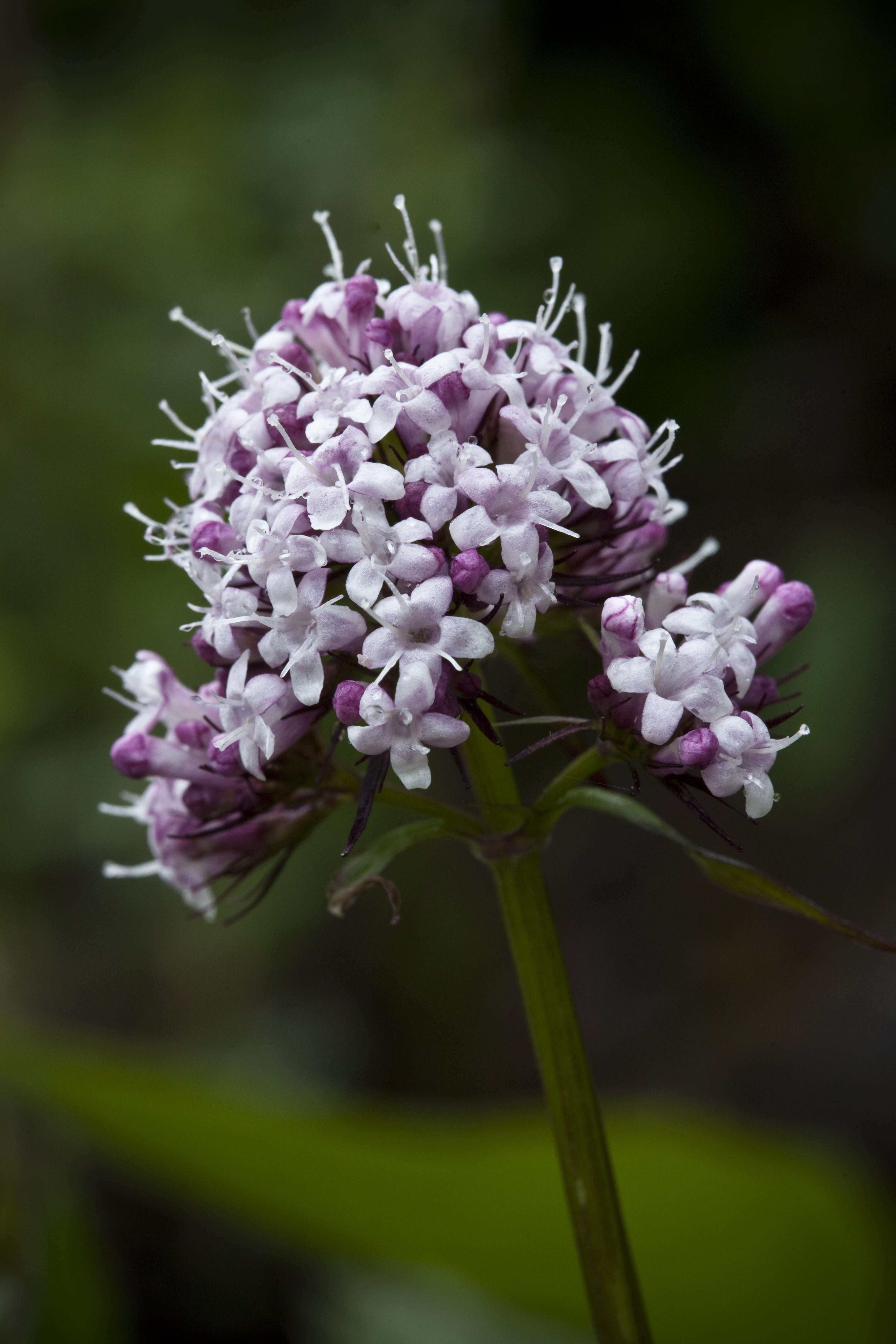 Capitate valerian (Valeriana capitata), Denali National Park and Preserve, AK, USA